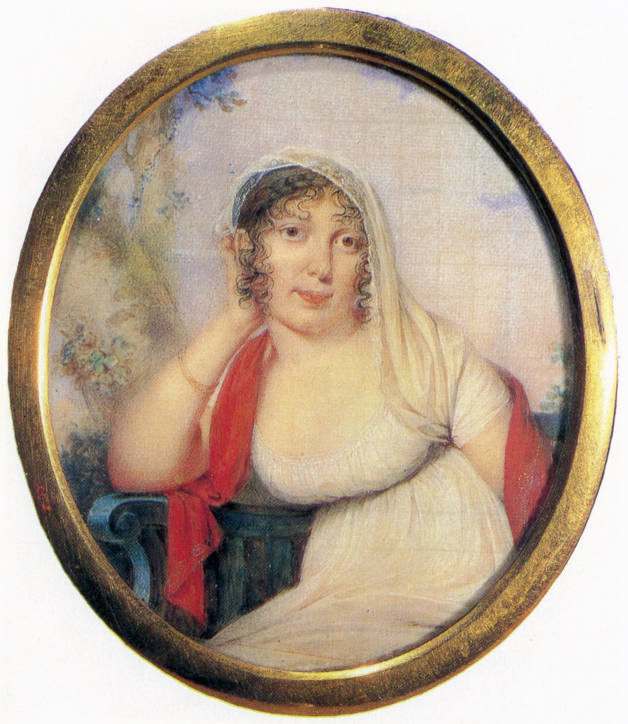 Агафоклея Александровна Полторацкая, ур.Шишкова (29.06.1737-12.10.1822), была замужем за Марком Федоровичем Полторацким.